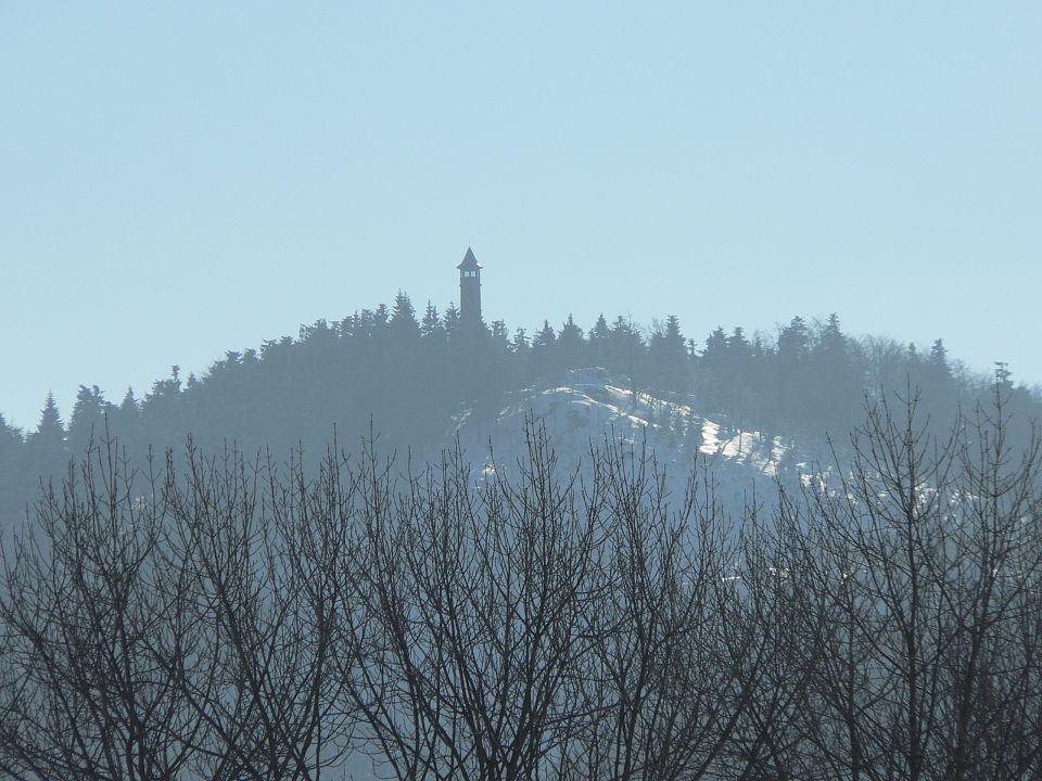 Hvězda Mountain (959 m) withˇ Štěpánka lookout tower, Karkonosze, Czech Republic